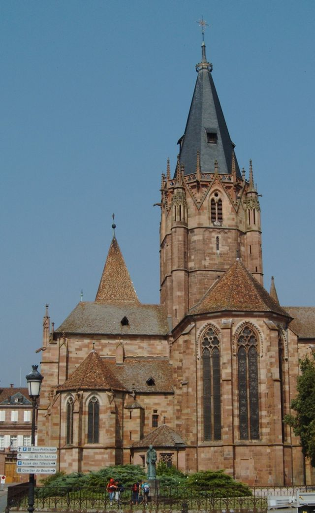 Stiftskirche in Weißenburg (Elsass), Frankreich.